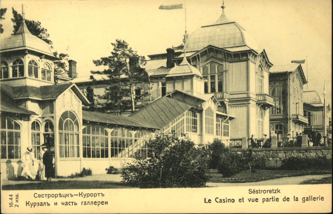 Сестрорецкий курзал